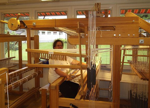 Damastvävstol med harneskutrustning ovanför och dragutrustning vid sidan (kan vara placerad ovanför slagbommen med). Kontramarchens lod vid sidan som skymmer solvskaften där bottenbindningen solvas. Längst till höger mönstersolvningen med dropplod som håller skaften på plats.